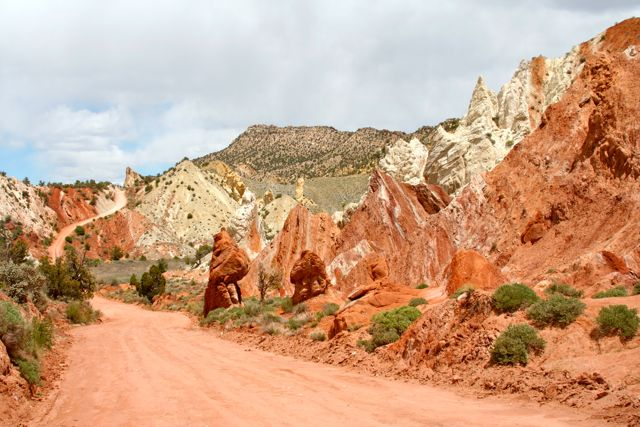 Rock formations near Cottonwood Canyon Road (Utah)